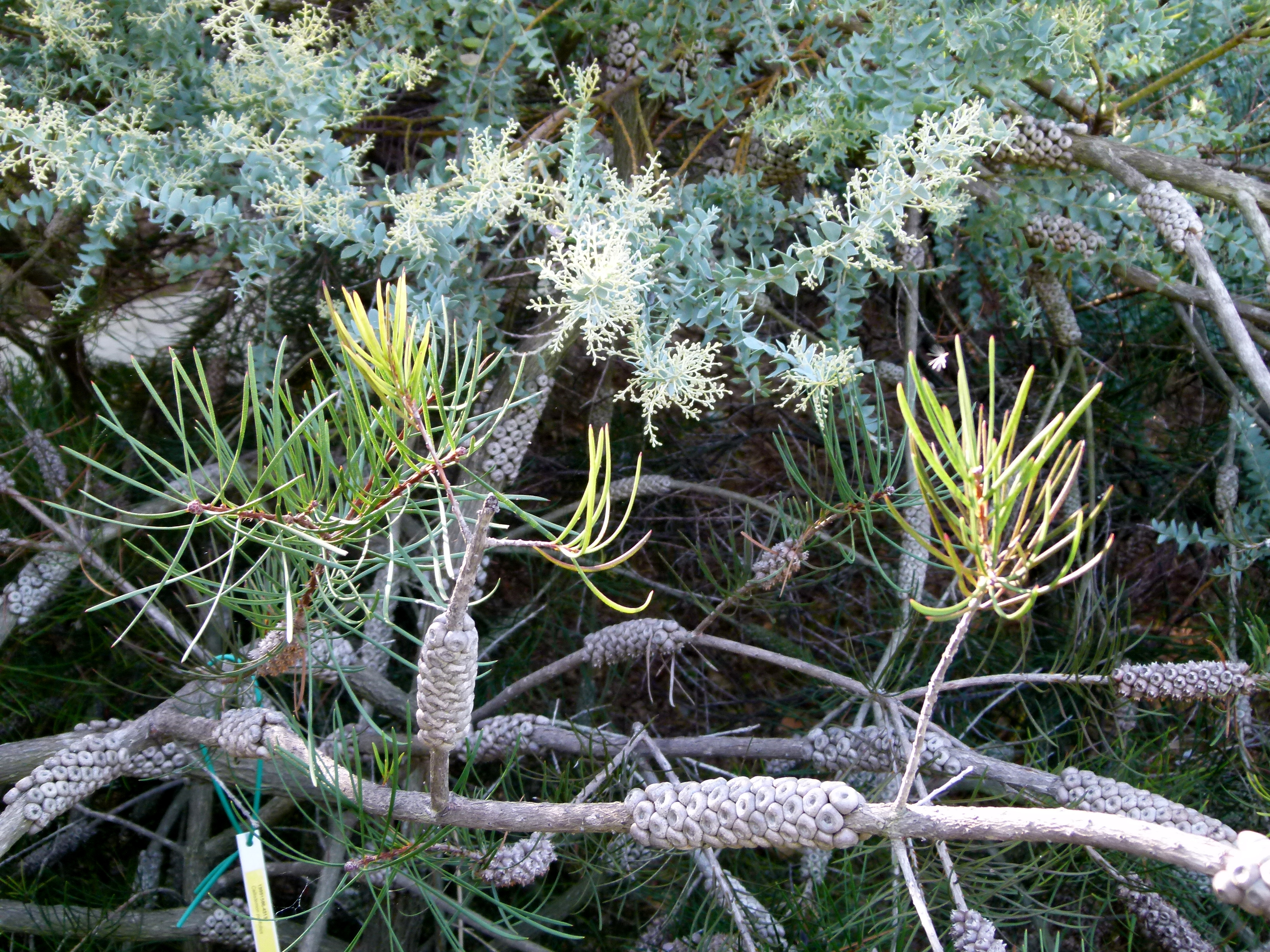 Jardin botanique Montjuic, Barcelone.